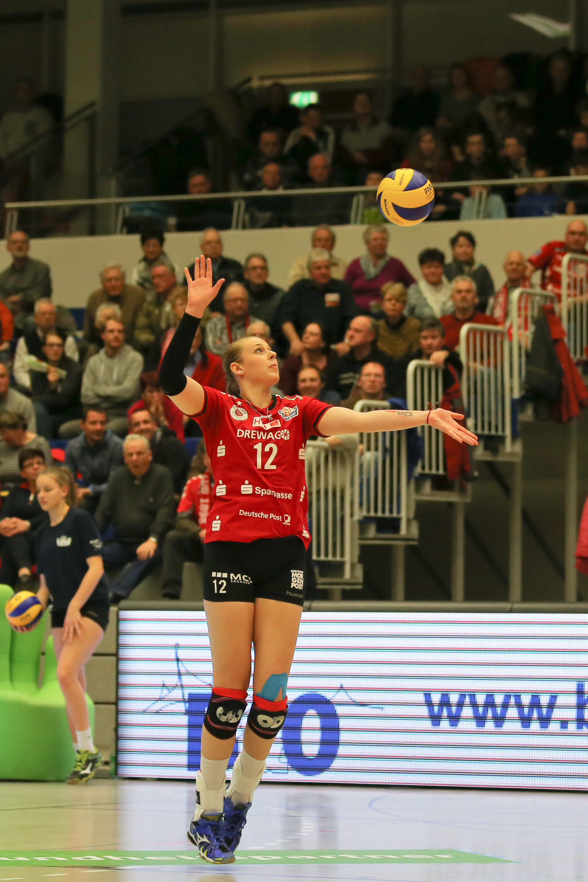 Volleyballspiel in der 1. Bundesliga des Dresdner SC gegen Aurubis Hamburg in der Margon Arena in Dresden.